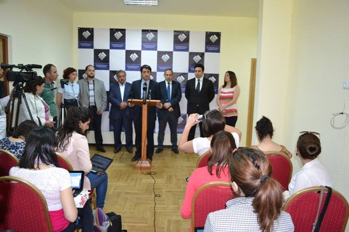 Civil contract (Armenia)